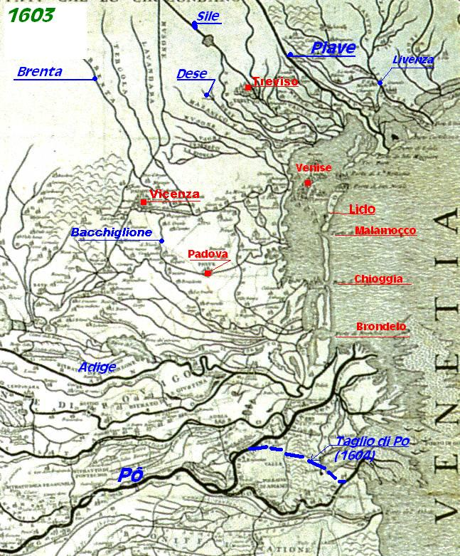 Les réseuax hydrauliques de la lagune de Venise